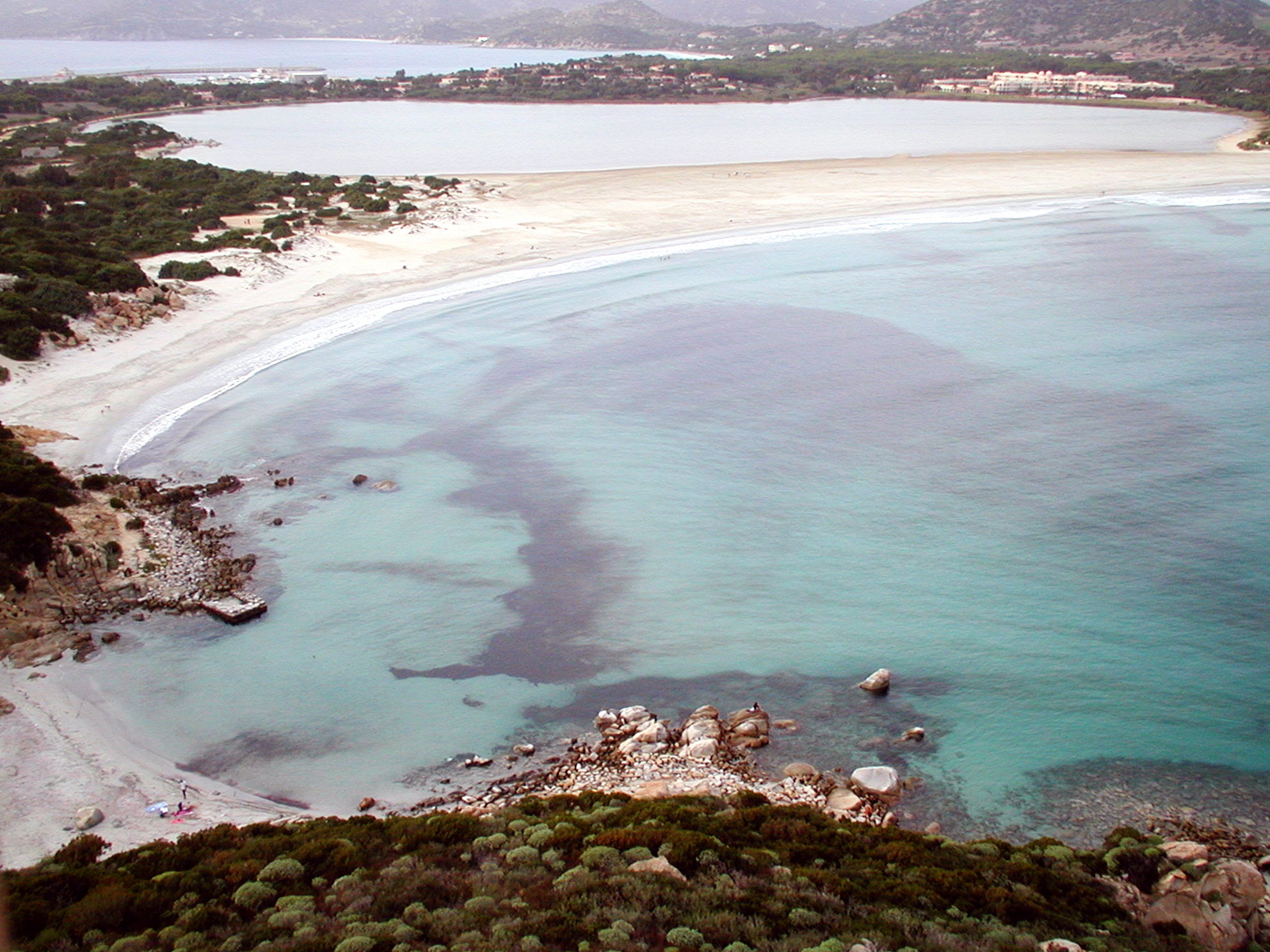 Veduta dalla Torre di Porto Giunco a Villasimius